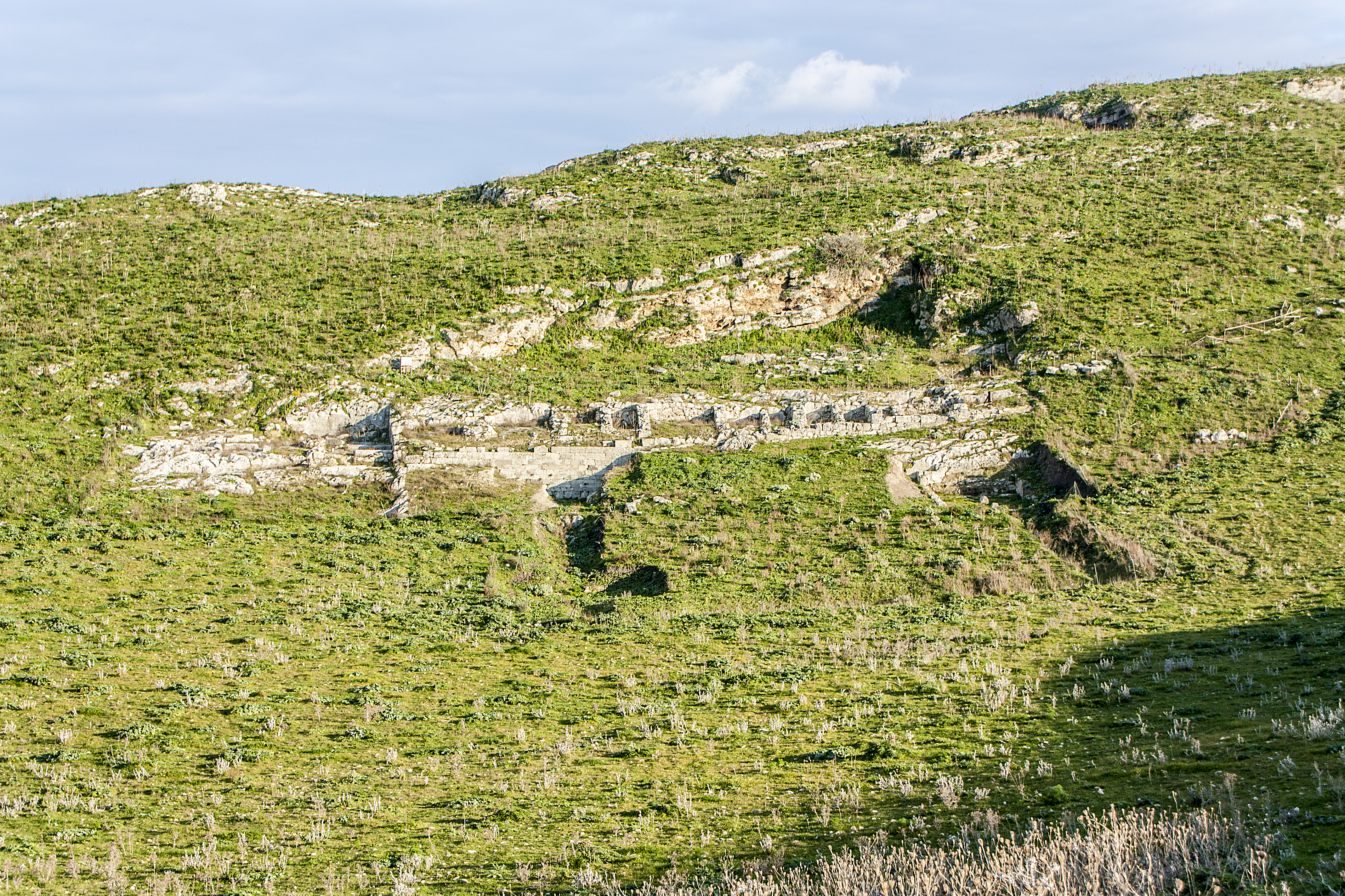 Agora di Entella